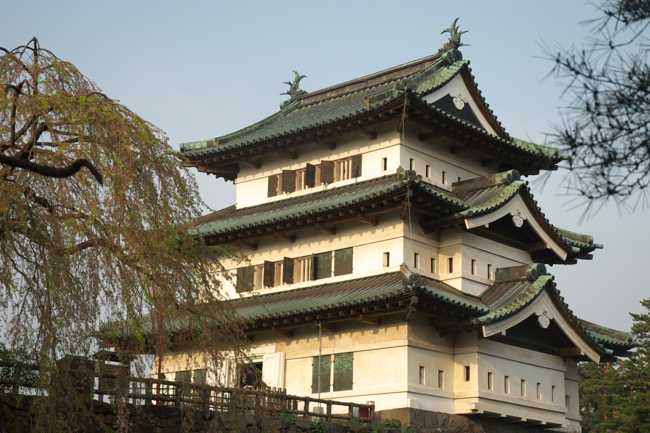 二の丸から天守を撮影。